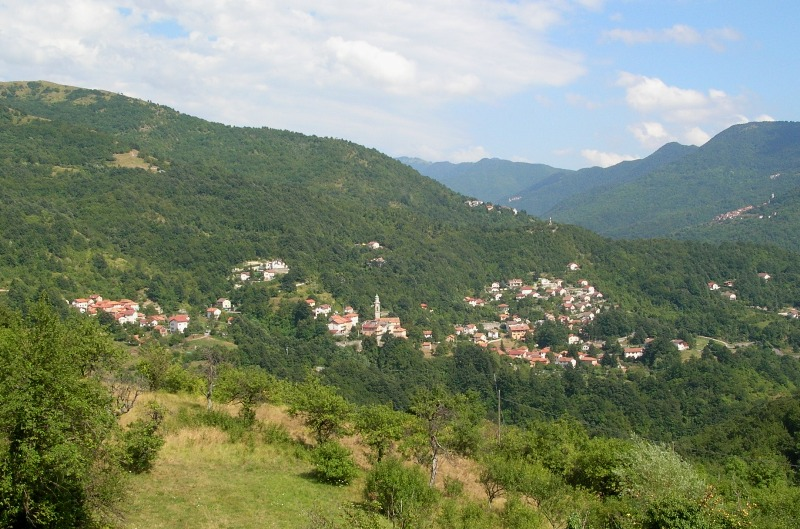 Foto propria Agosto 2008 Valbrevenna (Genova) - Veduta di Nenno